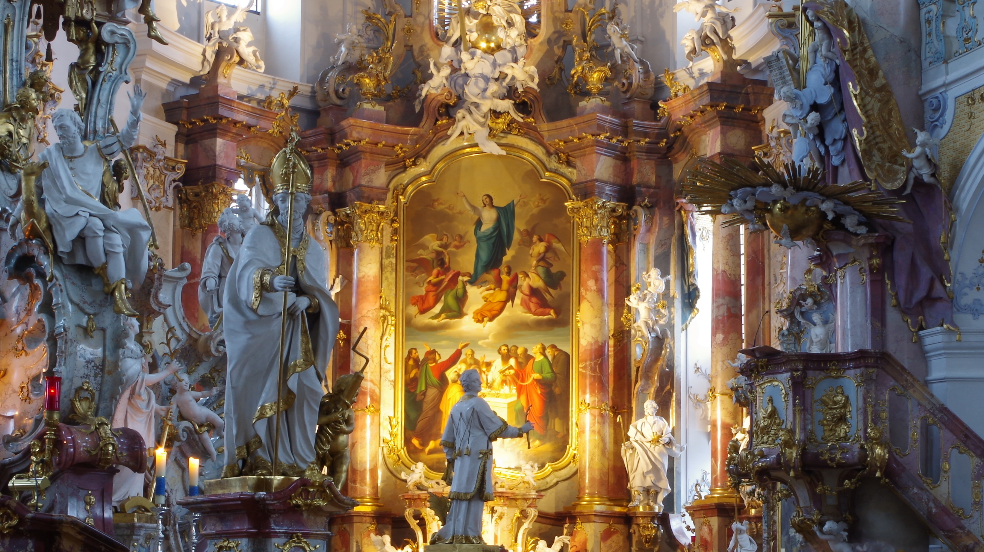 Hochaltar von Vierzehnheiligen mit Beleuchtung während einer Chorprobe für ein anschließendes Konzert